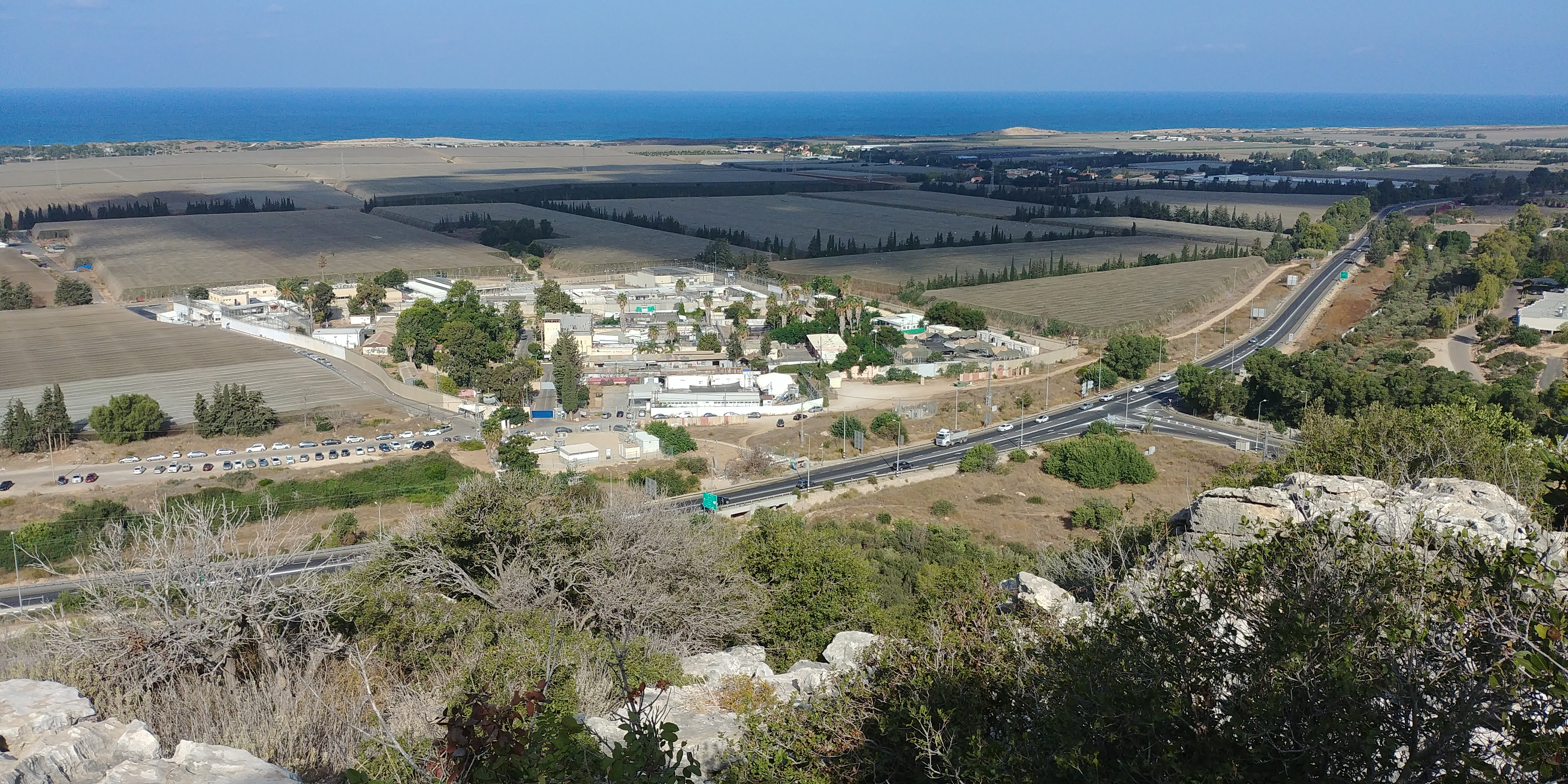 על רקע הים, צילום מרכס אצבע.